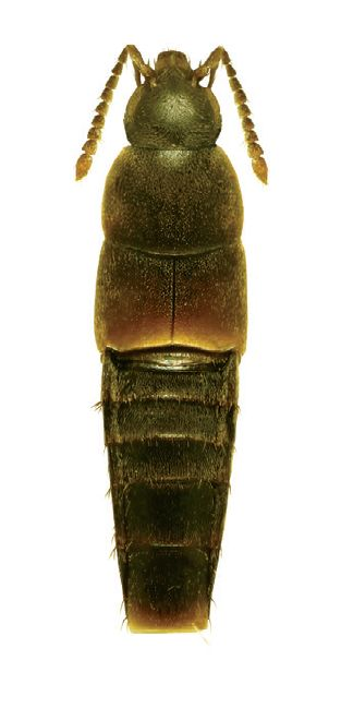 Myllaena ludificans